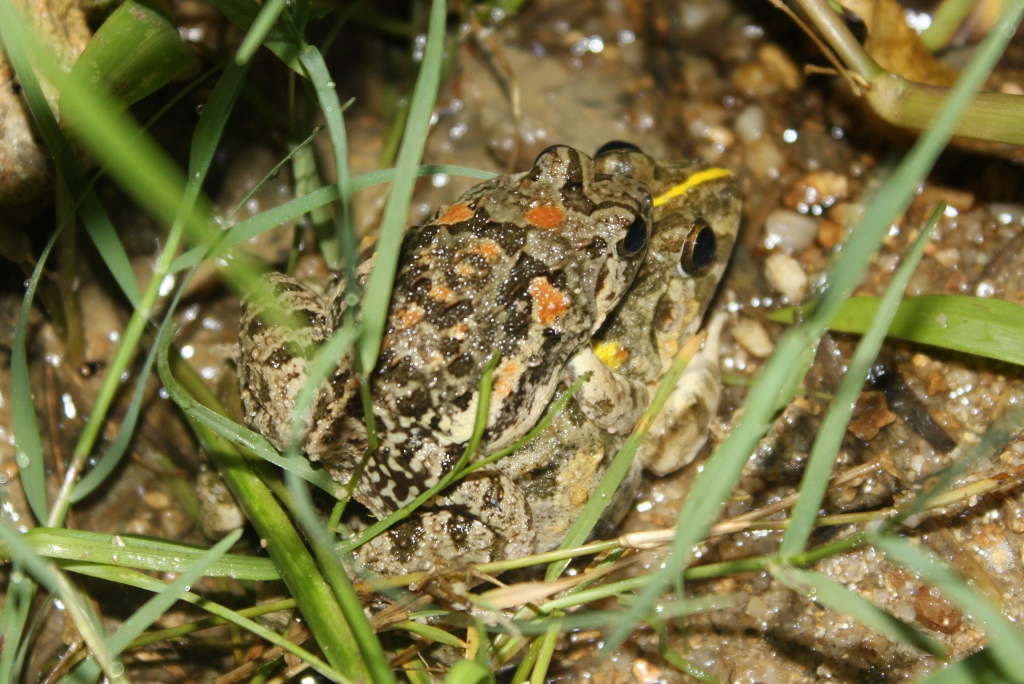 Taken at Mui Wo.